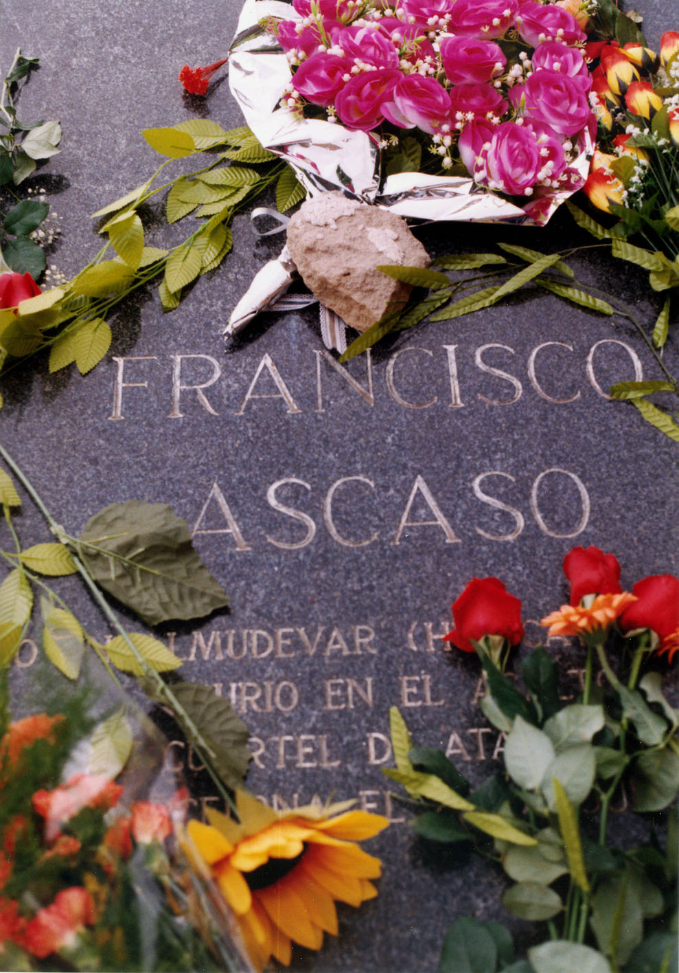 cementiri Montjuïc, tomba Francisco Ascaso